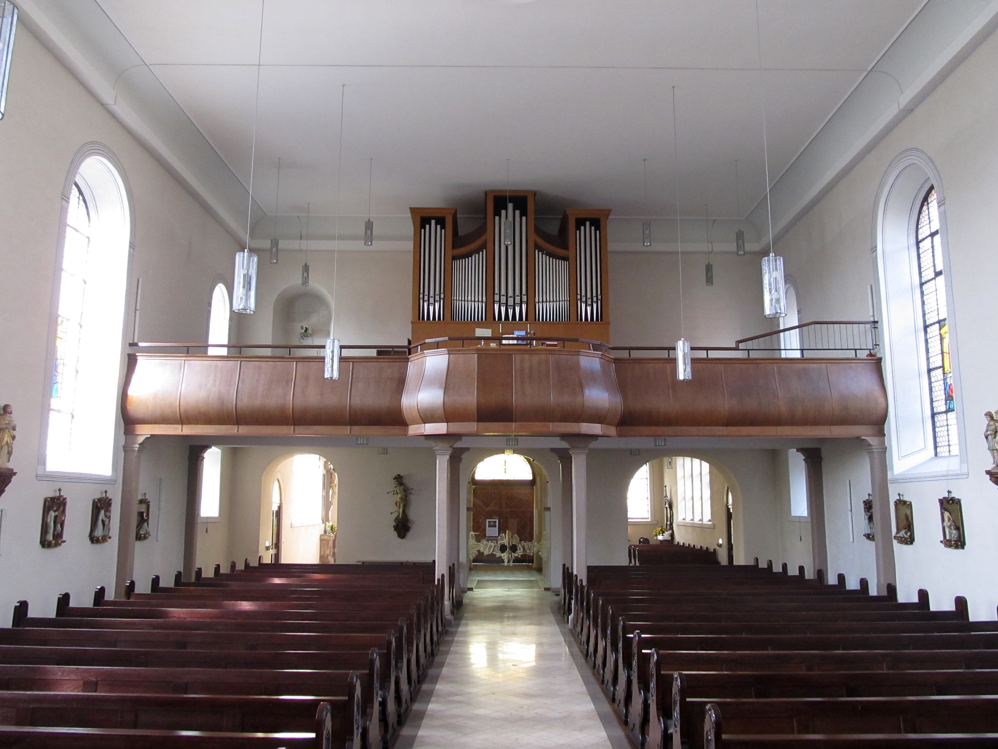 Blick ins Innere der katholischen Pfarrkirche Mariä Heimsuchung in Auersmacher, einem Ortsteil von Kleinblittersdorf, Regionalverband Saarbrücken